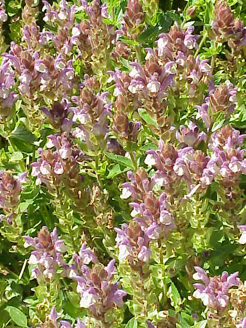 Species: Scutellaria alpina Family: Labiatae Image No. 3